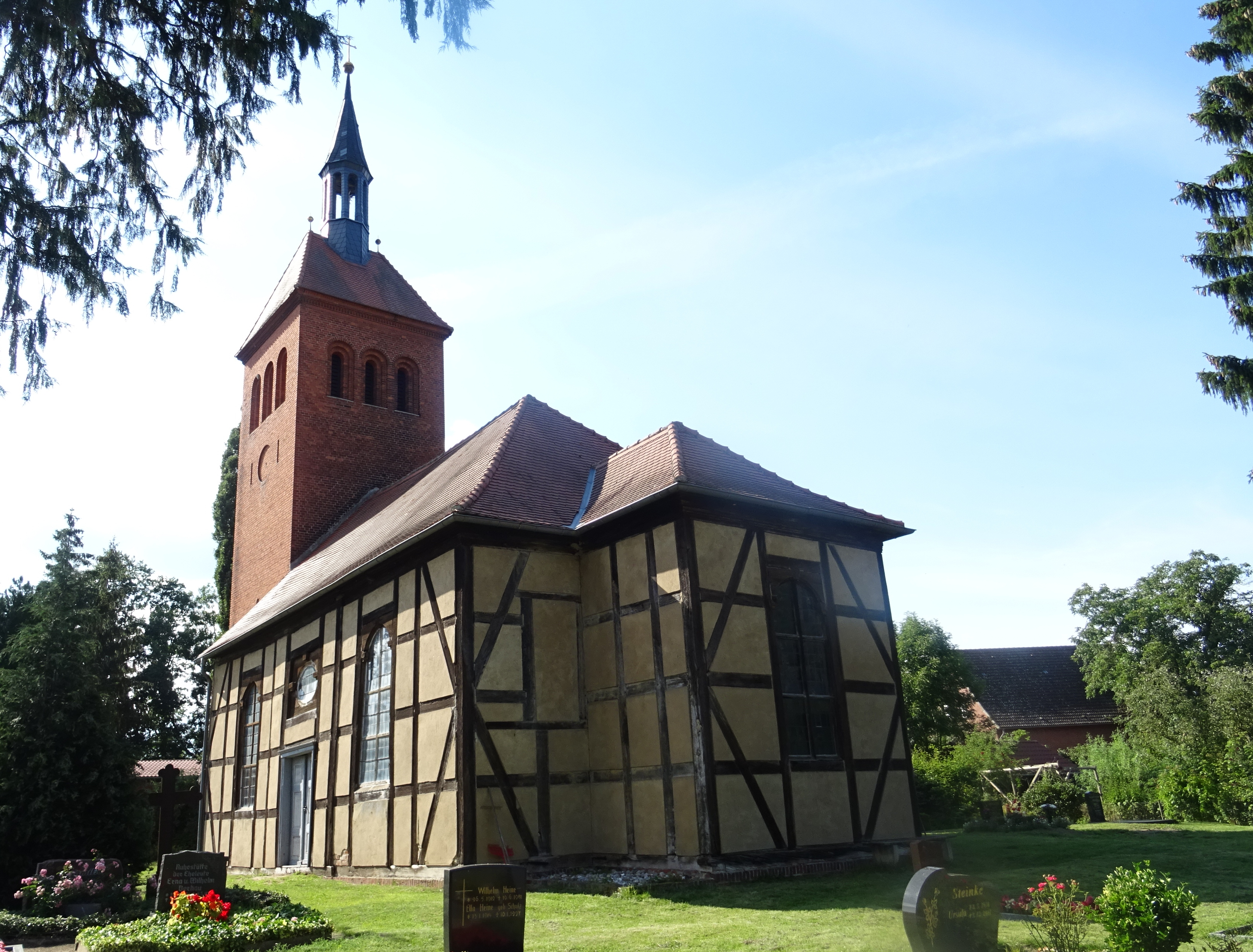 Beuster, Kirche. St. Marien (Kleinbeuster), Ansicht von Südosten